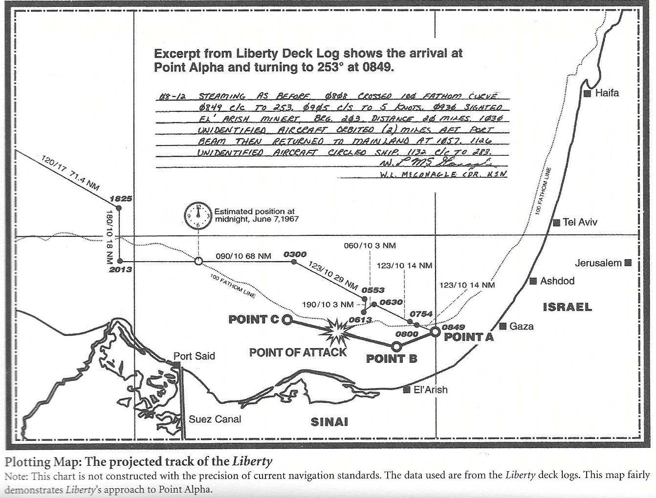 תרשים תנועת אוניית הביון ליברטי ב-8 ליוני 1967.